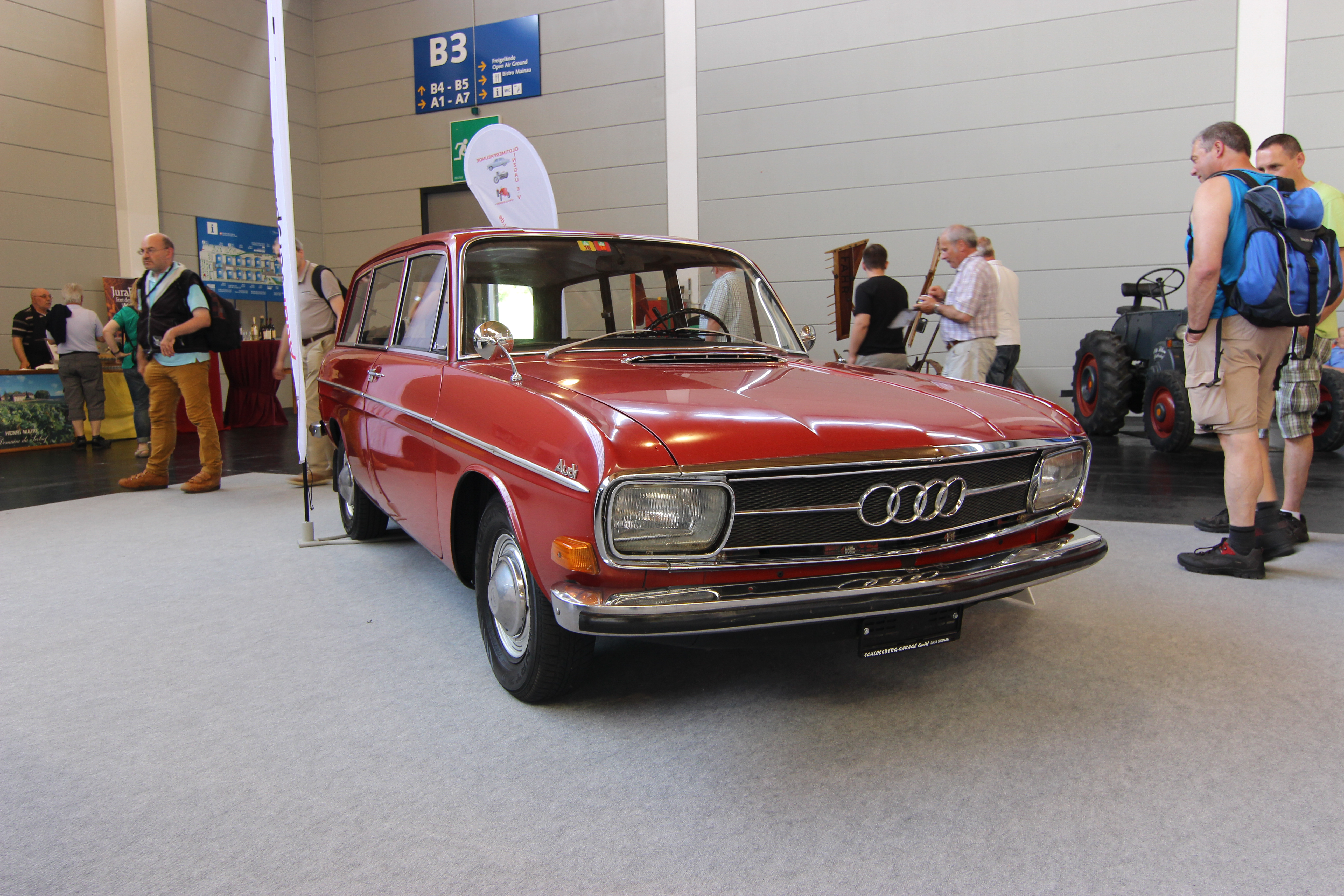 Audi 80 (F103)